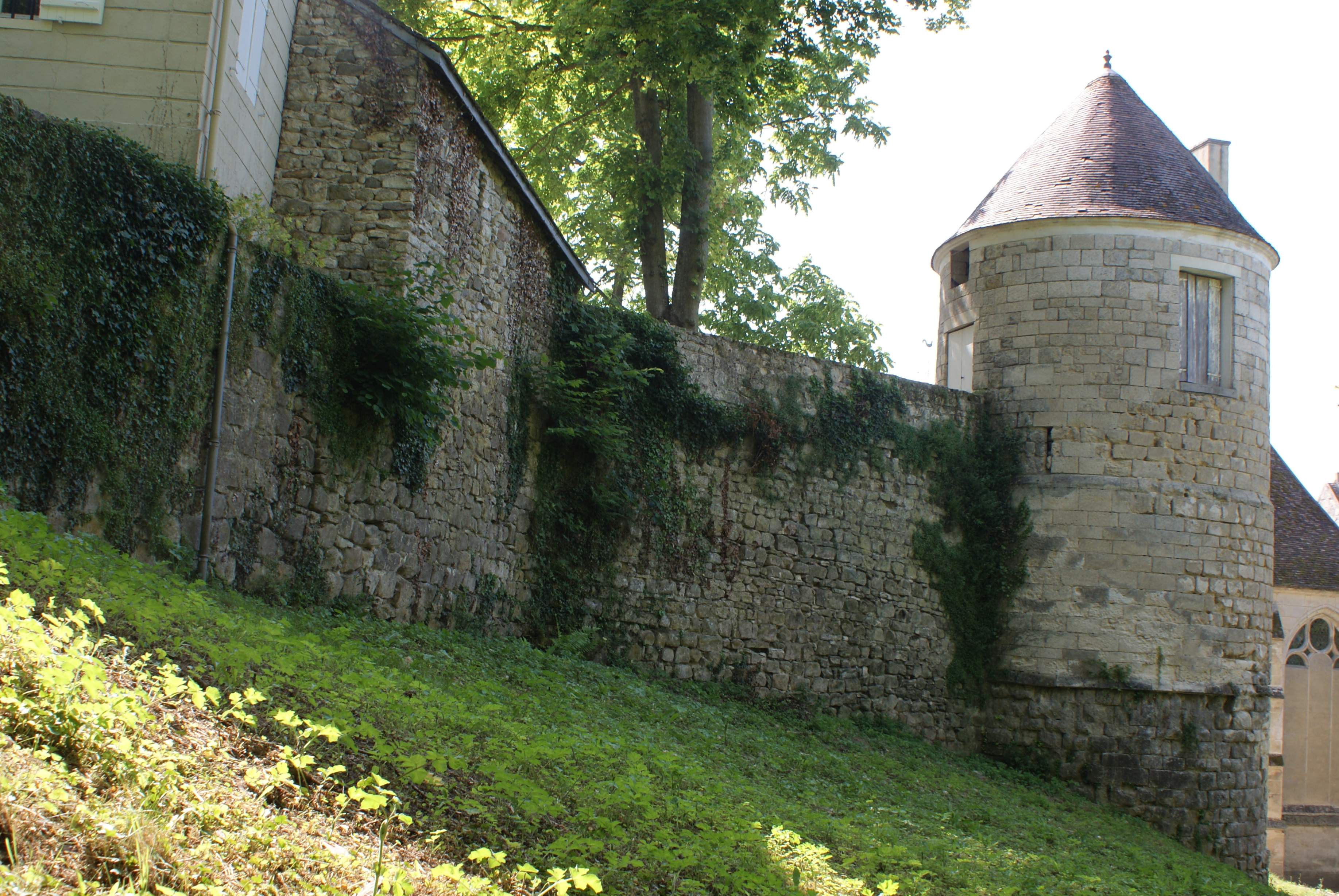 La seule tour en état de conservation, restaurée au XXe siècle, et une partie des remparts de ce qui reste du château de Gandelu, datant probablement du XIIe siècle.